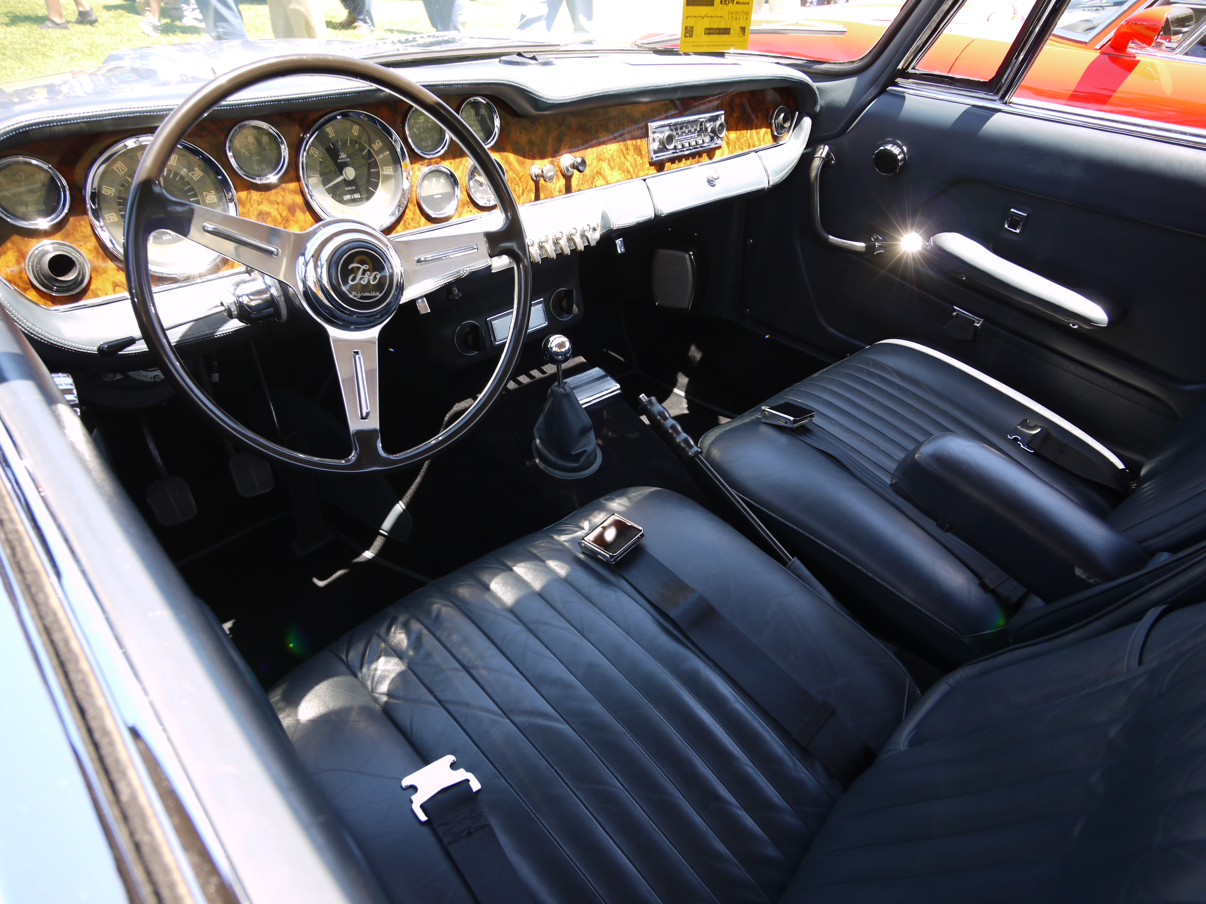 Iso Rivolta. Photograph taken at 2010 Concorso Italiano.